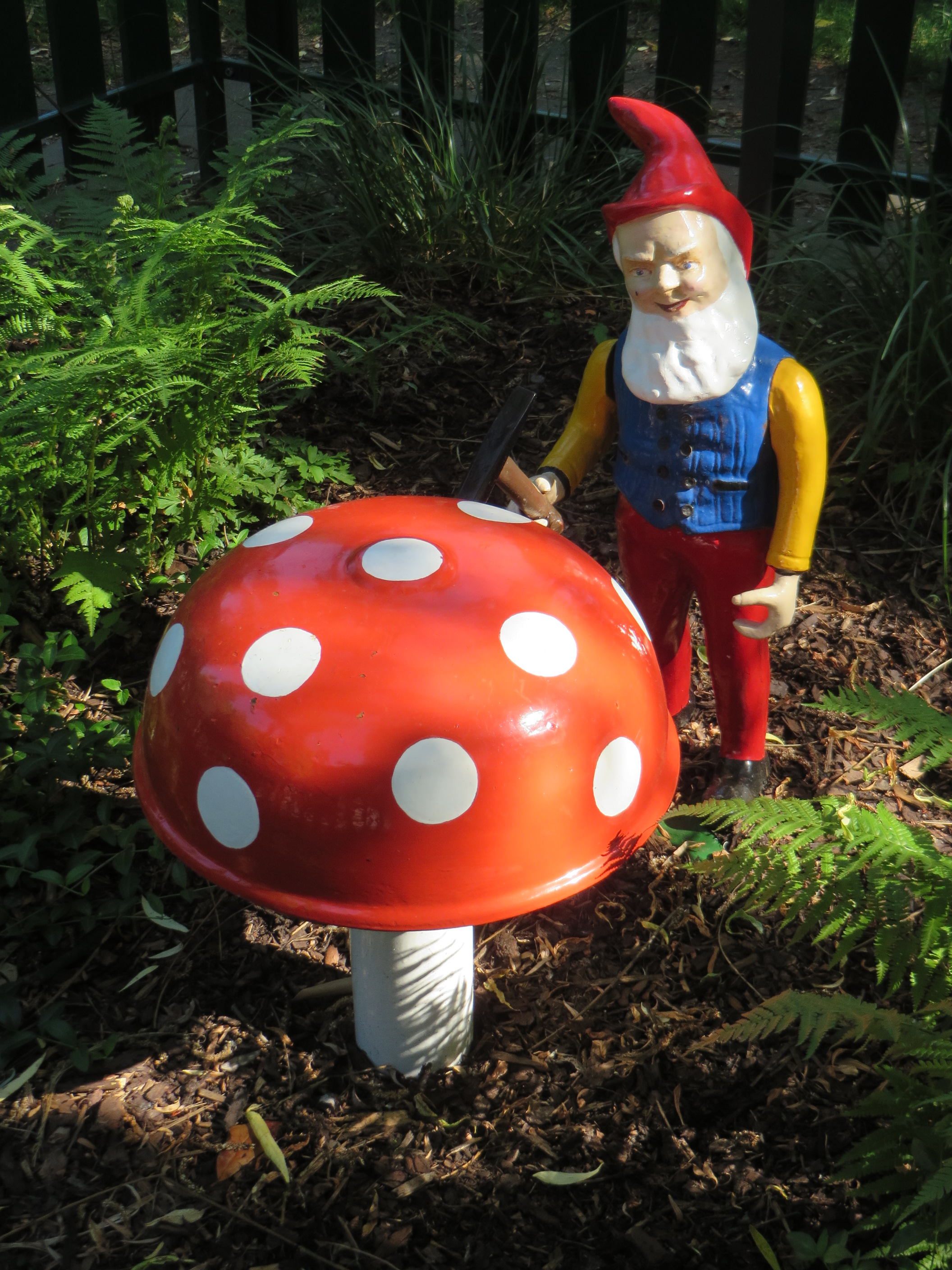 Socha trpaslíka.